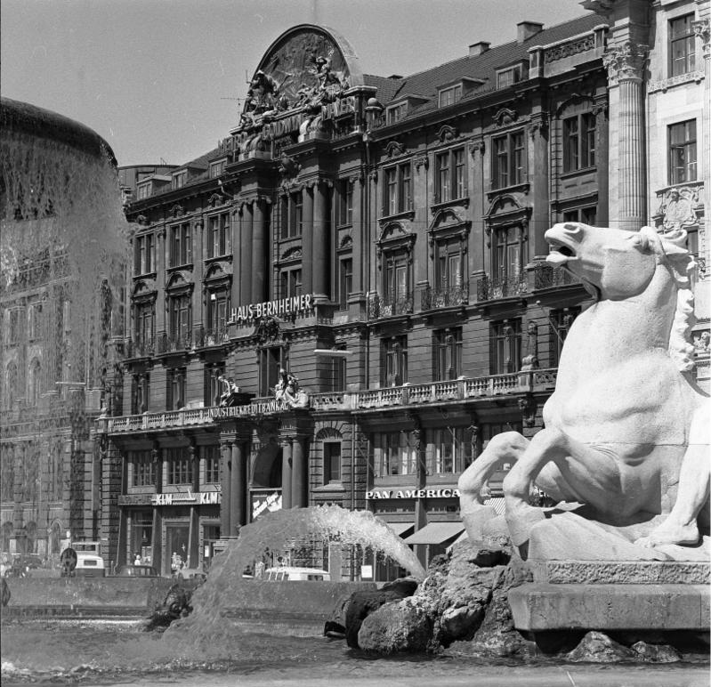 Kongress für die Europäische Politische Gemeinschaft in München